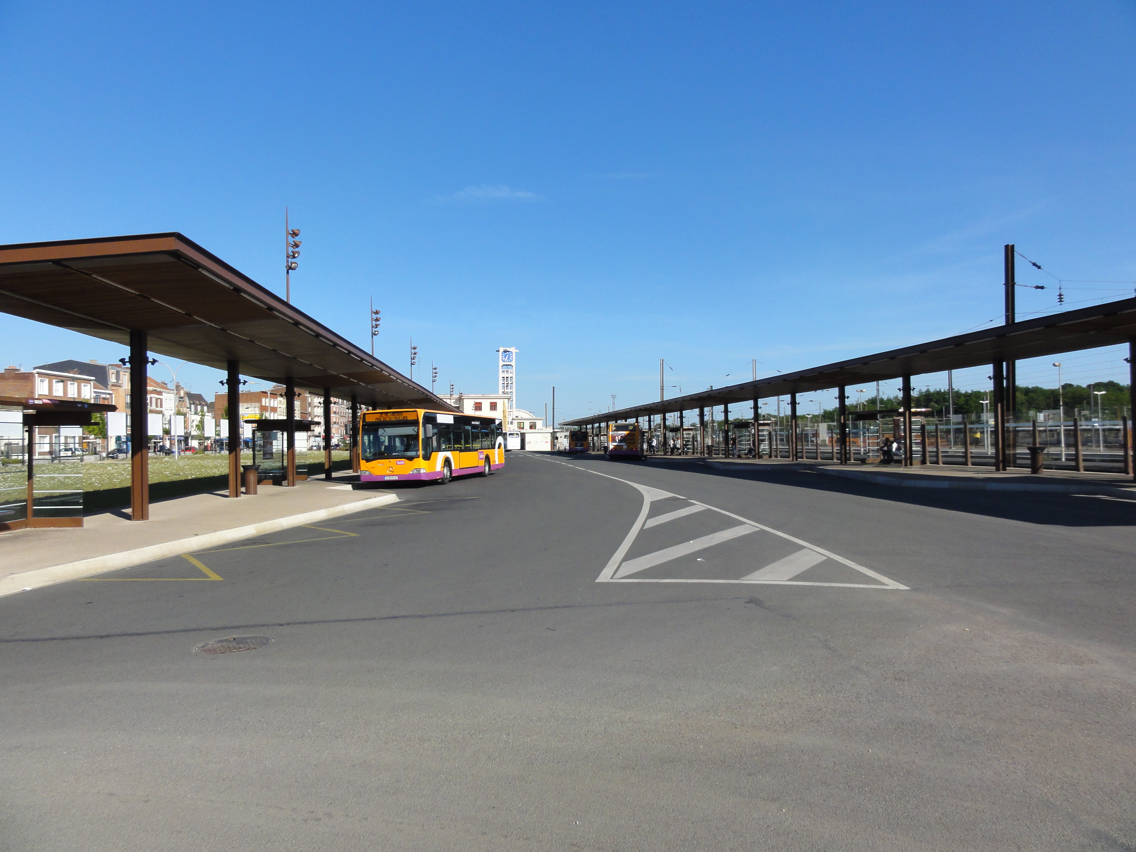 Bus Tadao à Lens, Pas-de-Calais, Nord-Pas-de-Calais, France.